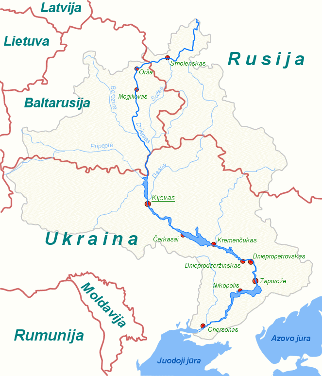 Dniepro baseinas